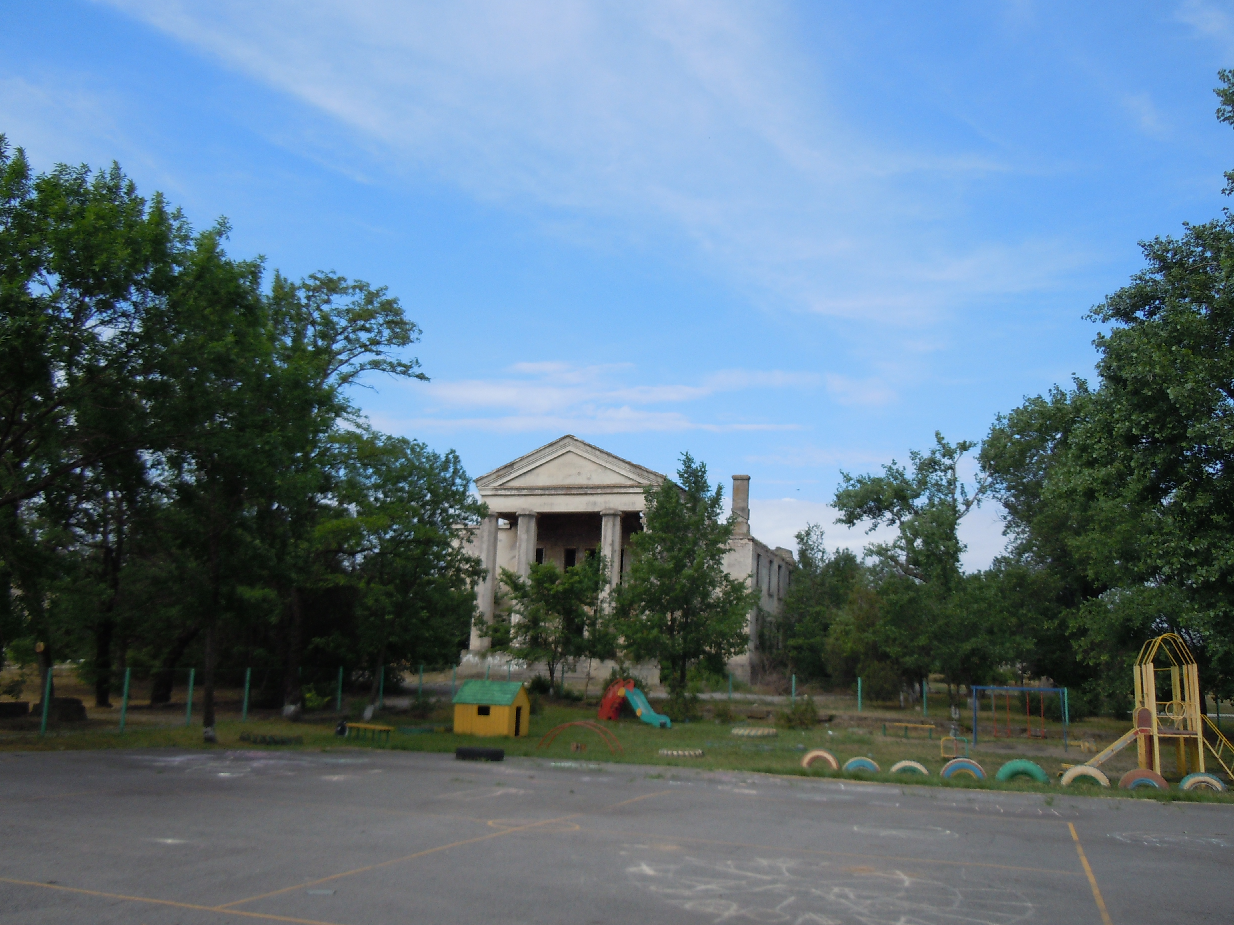 Село Нові Білярі, Комінтернівський район, Одеська область